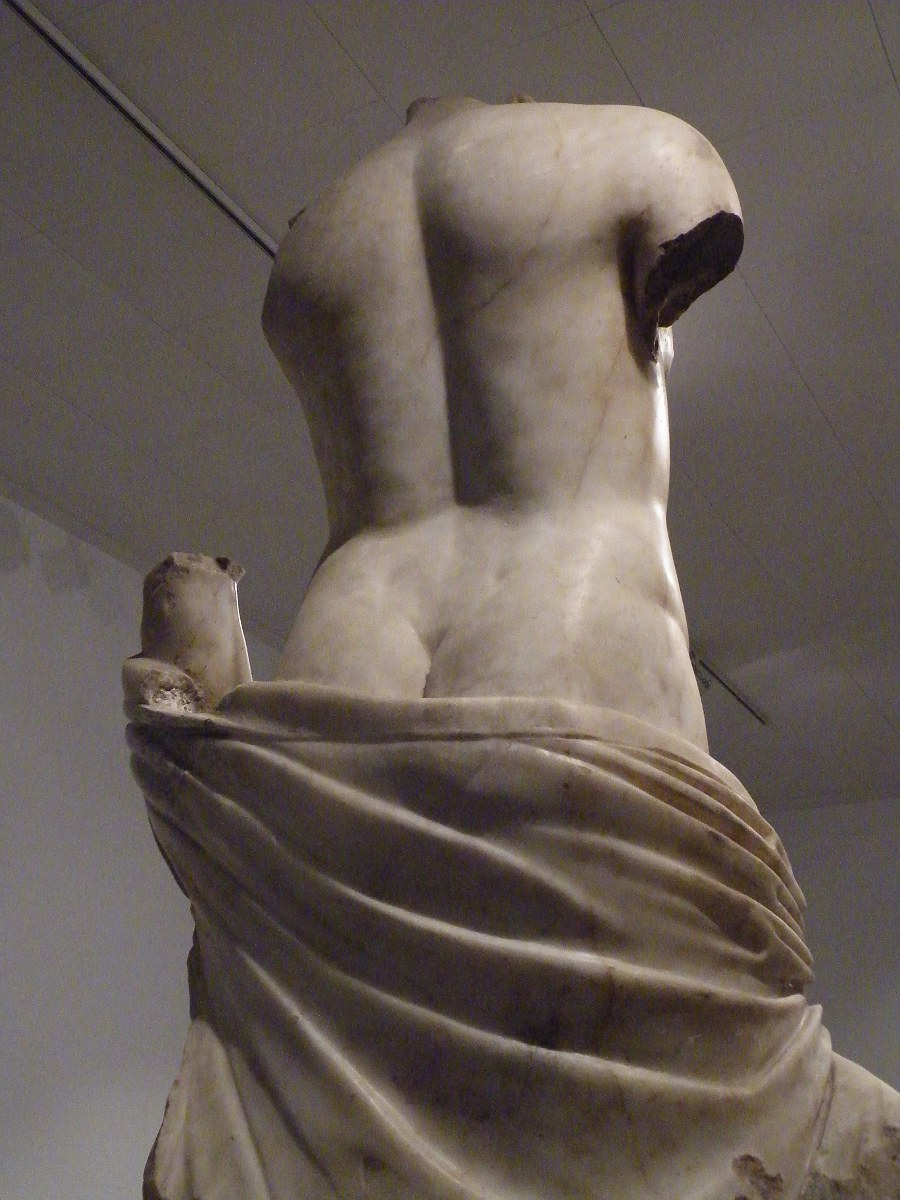 Plastik eines unbekannten Künstlers. Ausgegraben 1940 in Italica, Spanien